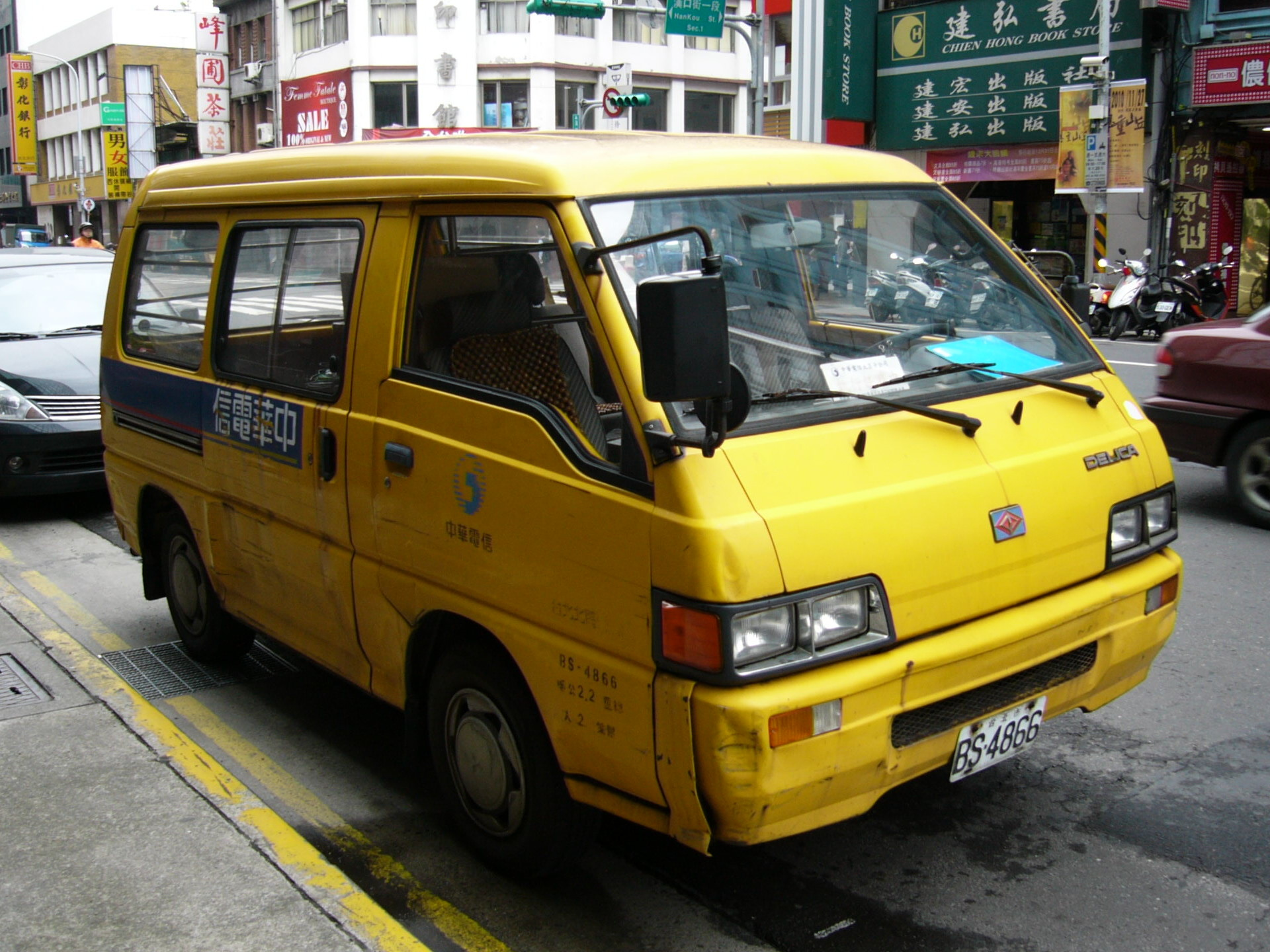 中華電信中華得利卡2.0 GL工程車BS-4866，停在臺北市中正區重慶南路一段。